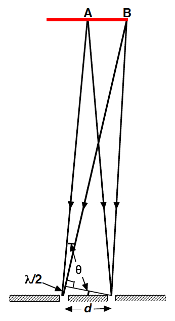 Schéma d'observation avec un diaphragme portant deux trous distants ("d") une source uniforme (en rouge). D'après les notes de Fizeau, 1851.